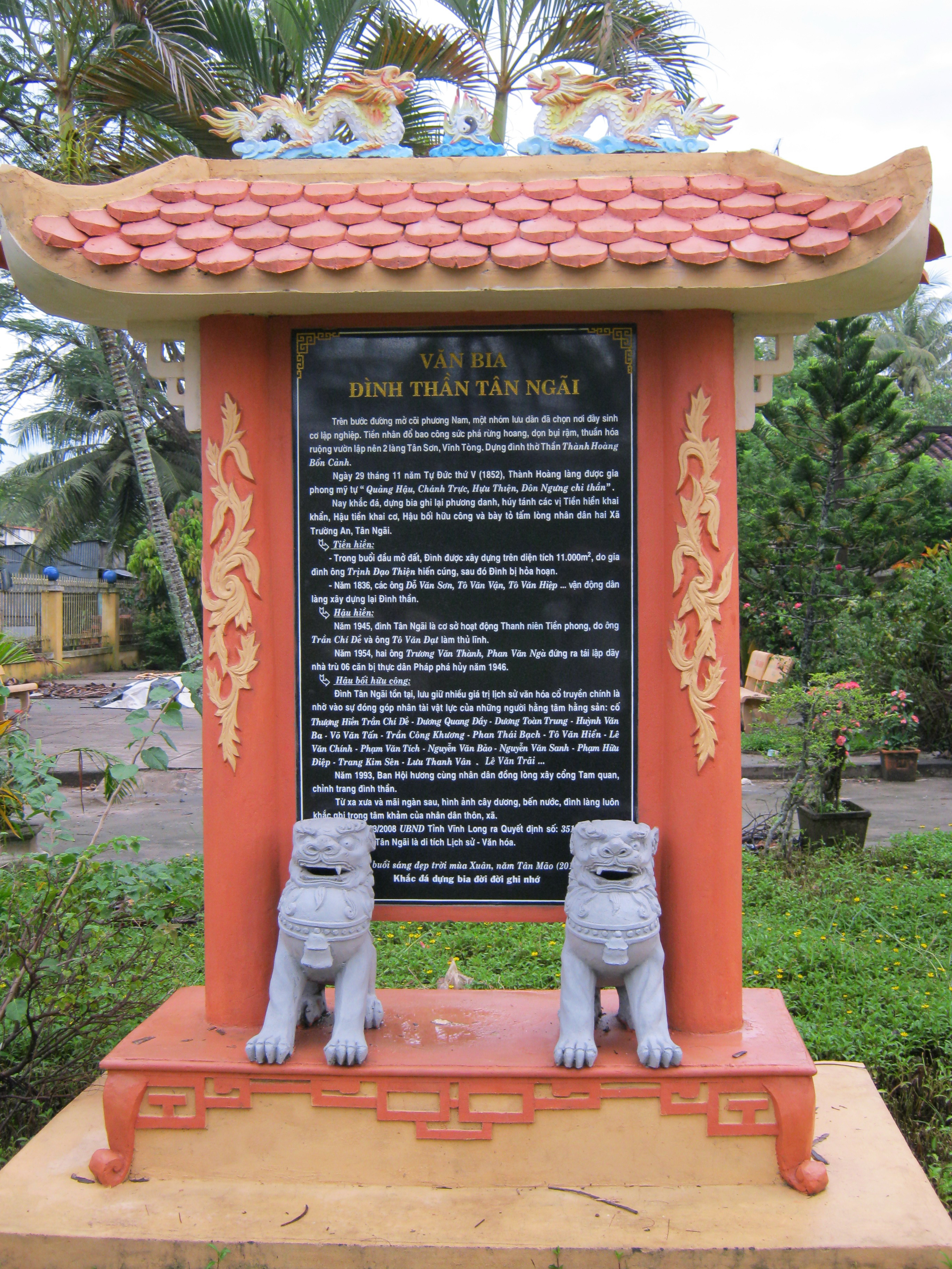 Bia đình Tân Ngãi dựng tạị đình Tân Ngãi (Tân Ngãi, Vĩnh Long, Việt Nam) năm 2011.